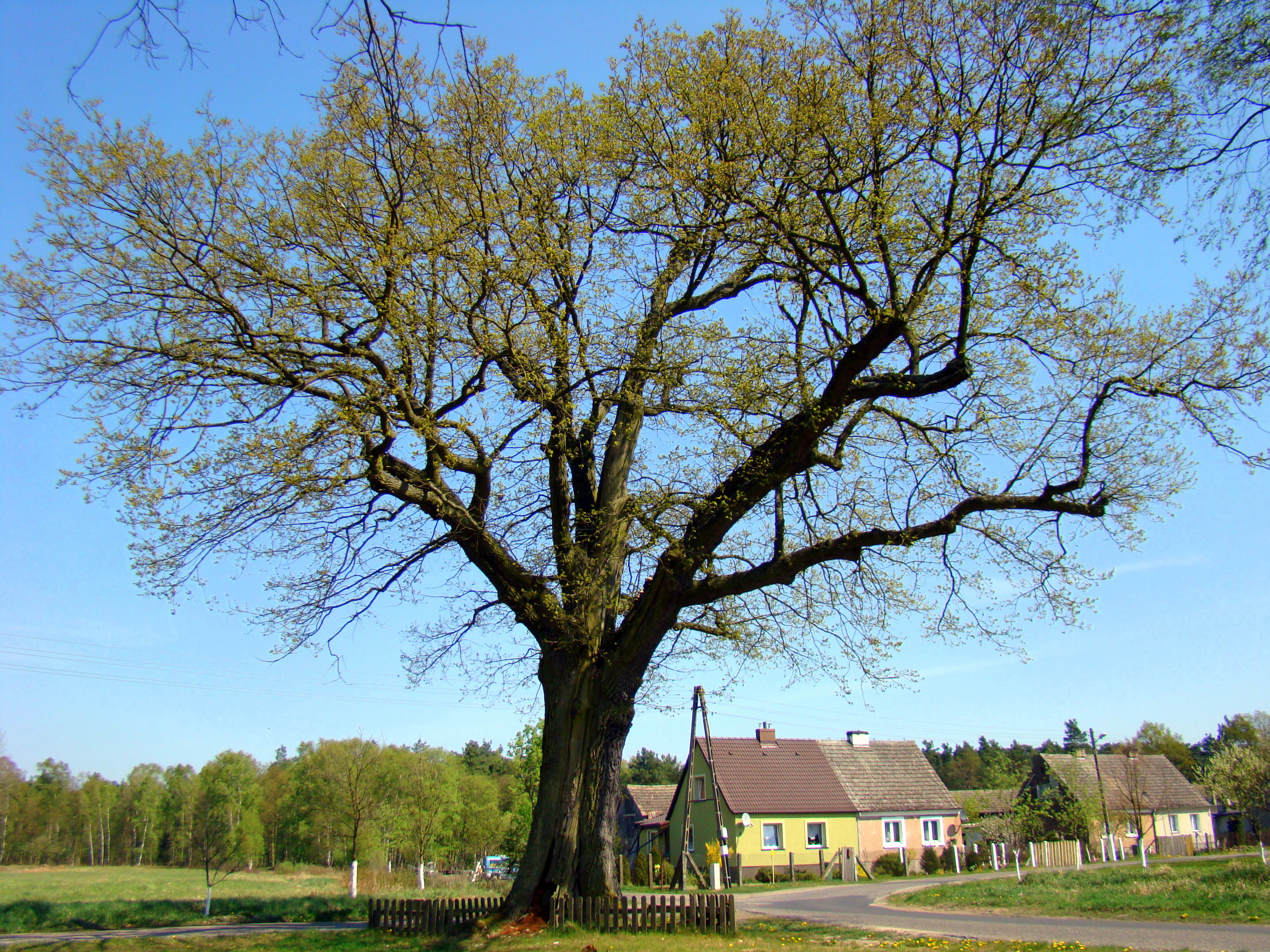 Drogoradz, (Gmina Police, Powiat policki, Województwo zachodniopomorskie), Polska